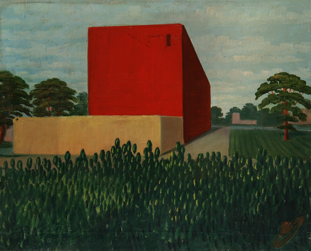 Холст, масло. 49х61. Национальный художественный музей РБ